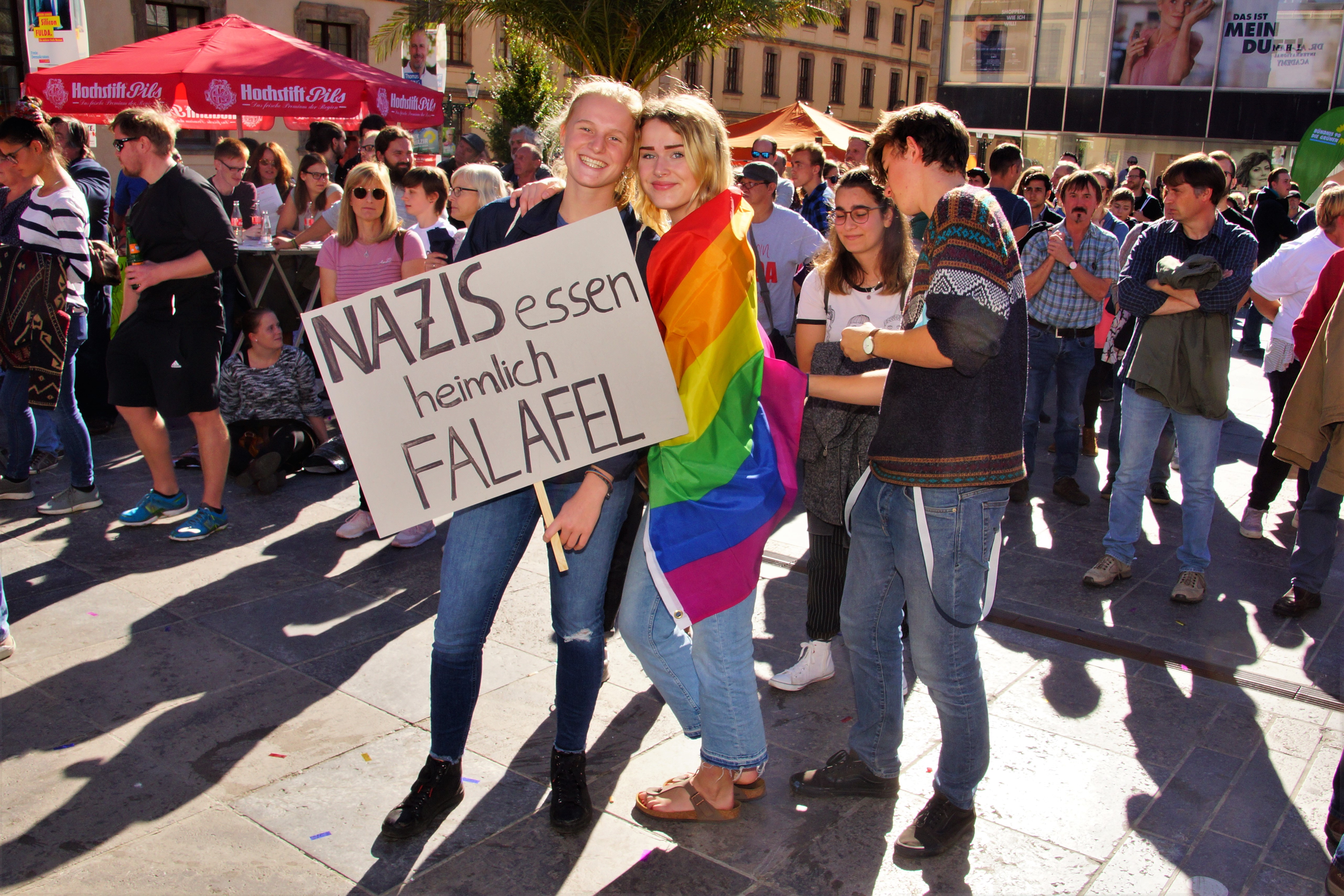 Bunte Demo